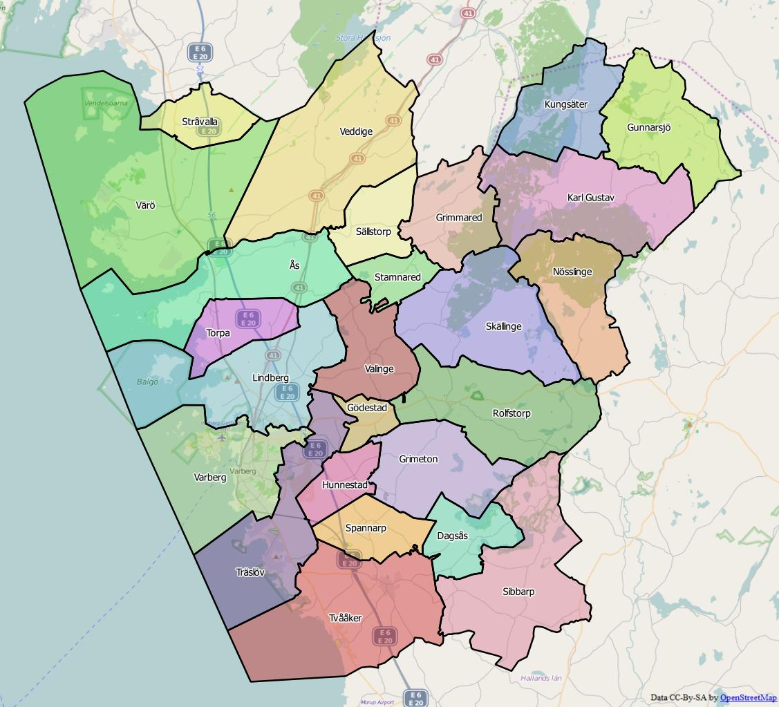 Distriktsindelningen i Varbergs kommun World file